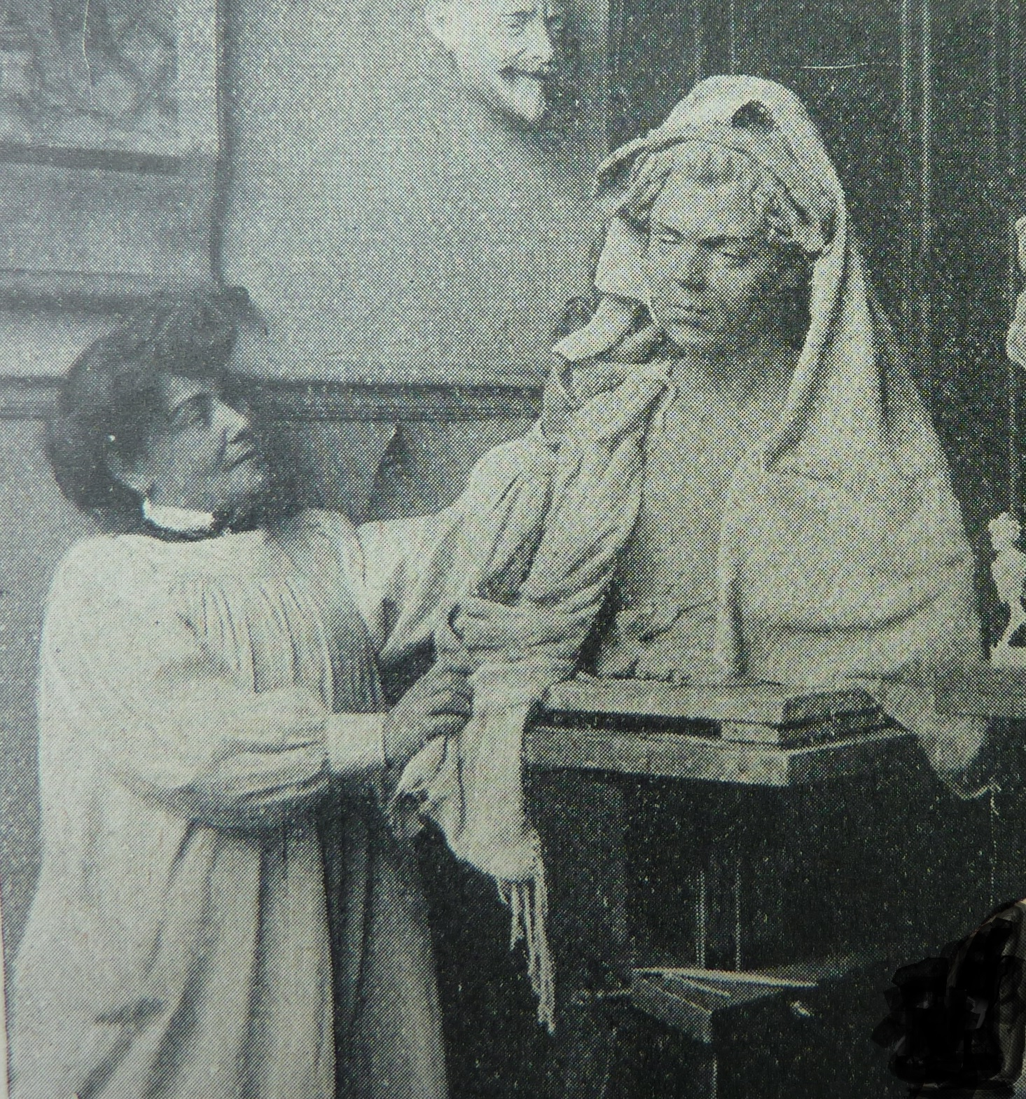 Odette Dulac manie l'ébauchoir